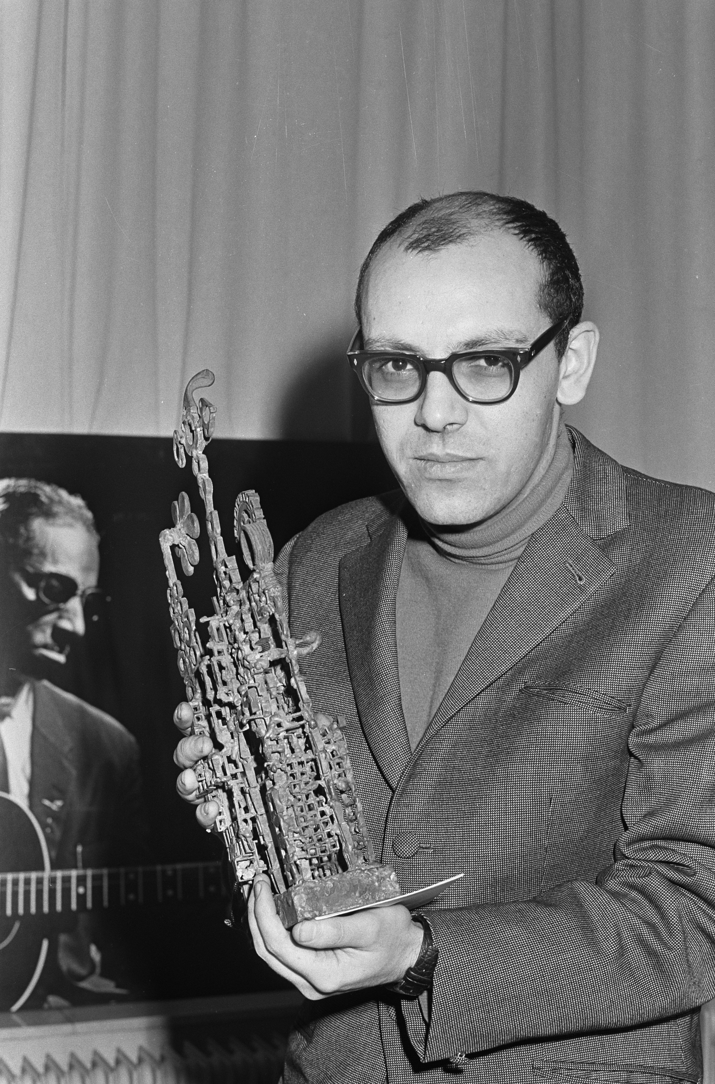 Collectie / Archief : Fotocollectie Anefo Reportage / Serie : [ onbekend ] Beschrijving : Misja Mengelberg winnaar jazzprijs, Jan de Troye reikt de prijs uit Datum : 19 december 1966 Trefwoorden : PRIJSWinnaars Fotograaf : Merk, Ben / Anefo Auteursrechthebbende : Nationaal Archief Materiaalsoort : Negatief (zwart/wit) Nummer archiefinventaris : bekijk toegang 2.24.01.05 Bestanddeelnummer : 919-8964